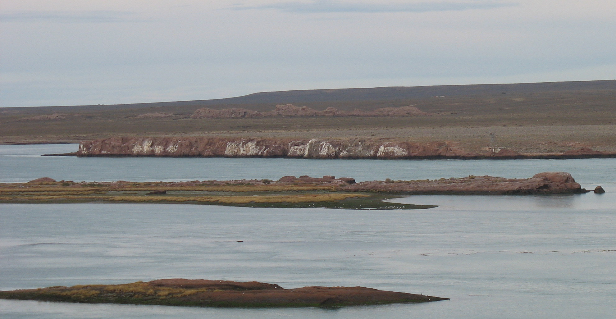 Vista de la barranca de los cormoranes en la isla Elena, en la ría Deseado (Santa Cruz, Patagonia Argentina)